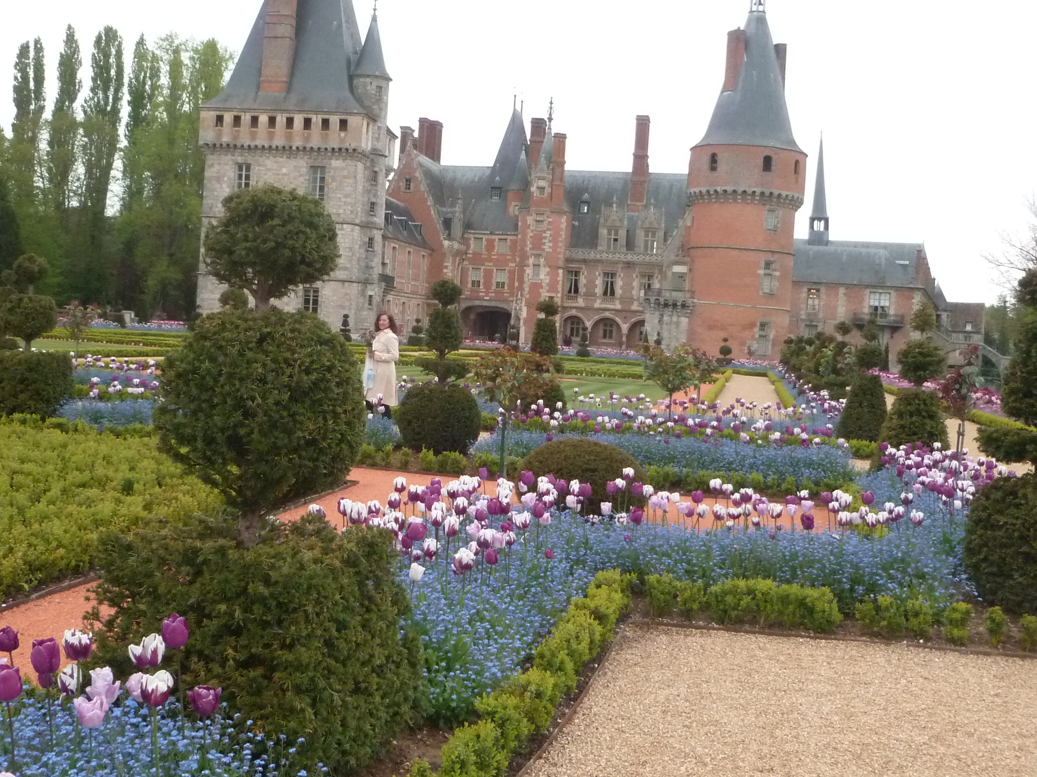 le jardin et le château de Maintenon